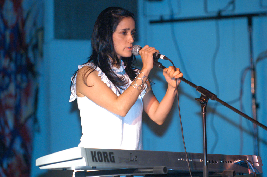 La cantante Julieta Venegas, participó en el evento "“Mujeres sin miedo, Todas somos Atenco” en el Salón Los Ángeles, al que también asistió el Subcomandante Marcos para reclamar justicia en el caso de las mujeres violadas en San Salvador Atenco.